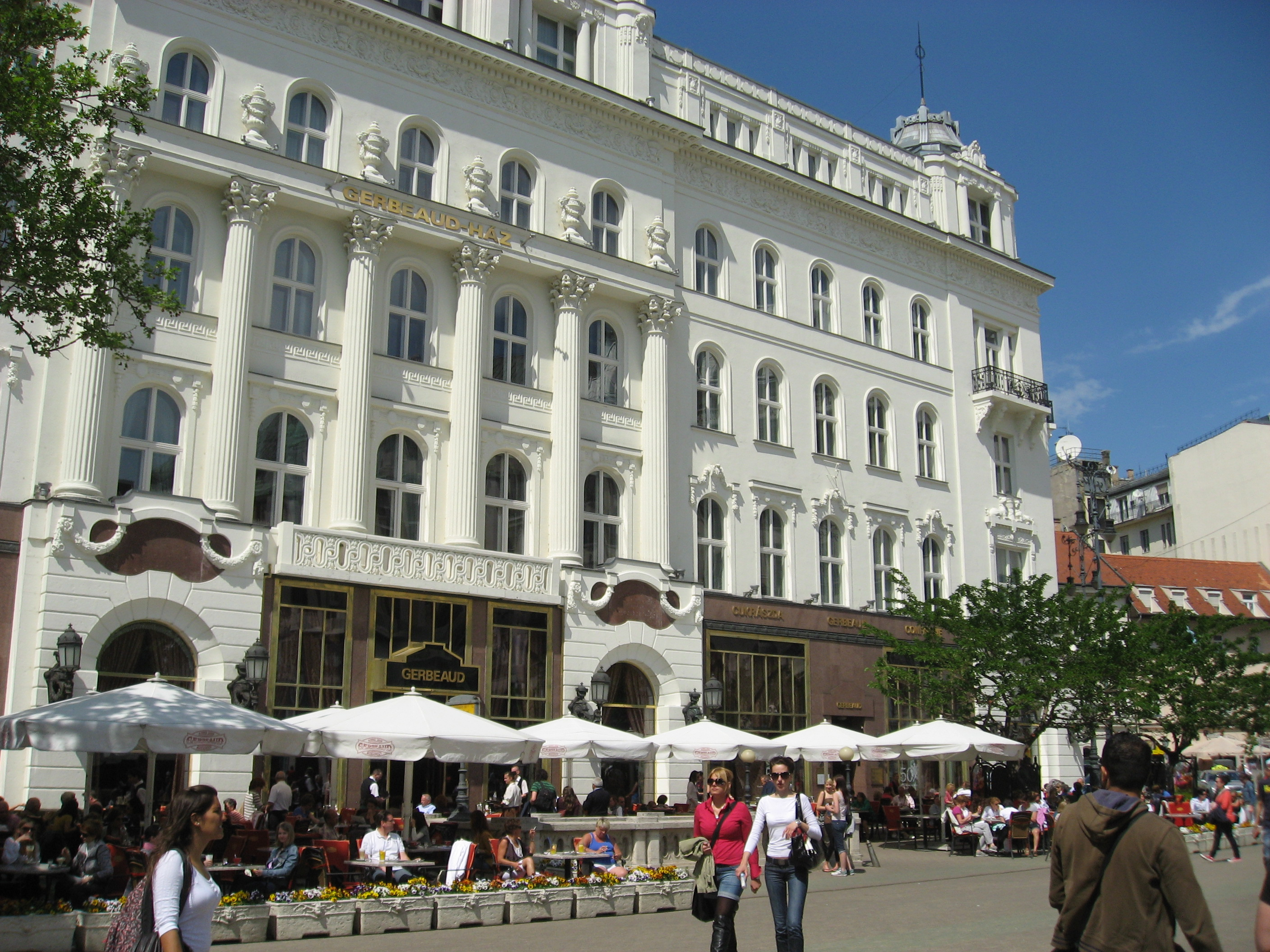 Budapešť